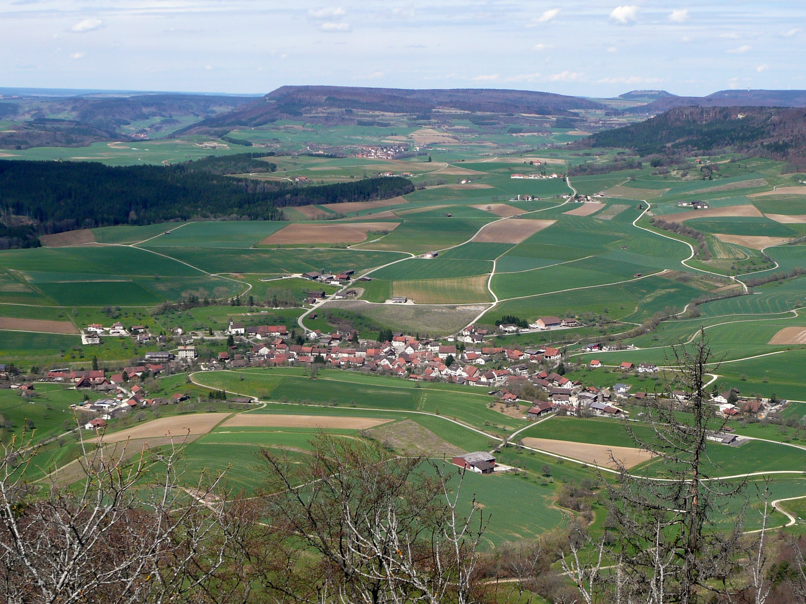 Blick vom Schleitheimer Randenturm auf Beggingen im Kanton Schaffhausen/Schweiz.